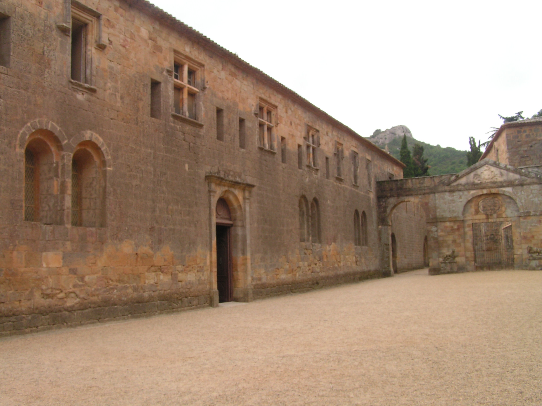 Abbaye de Fontfroide